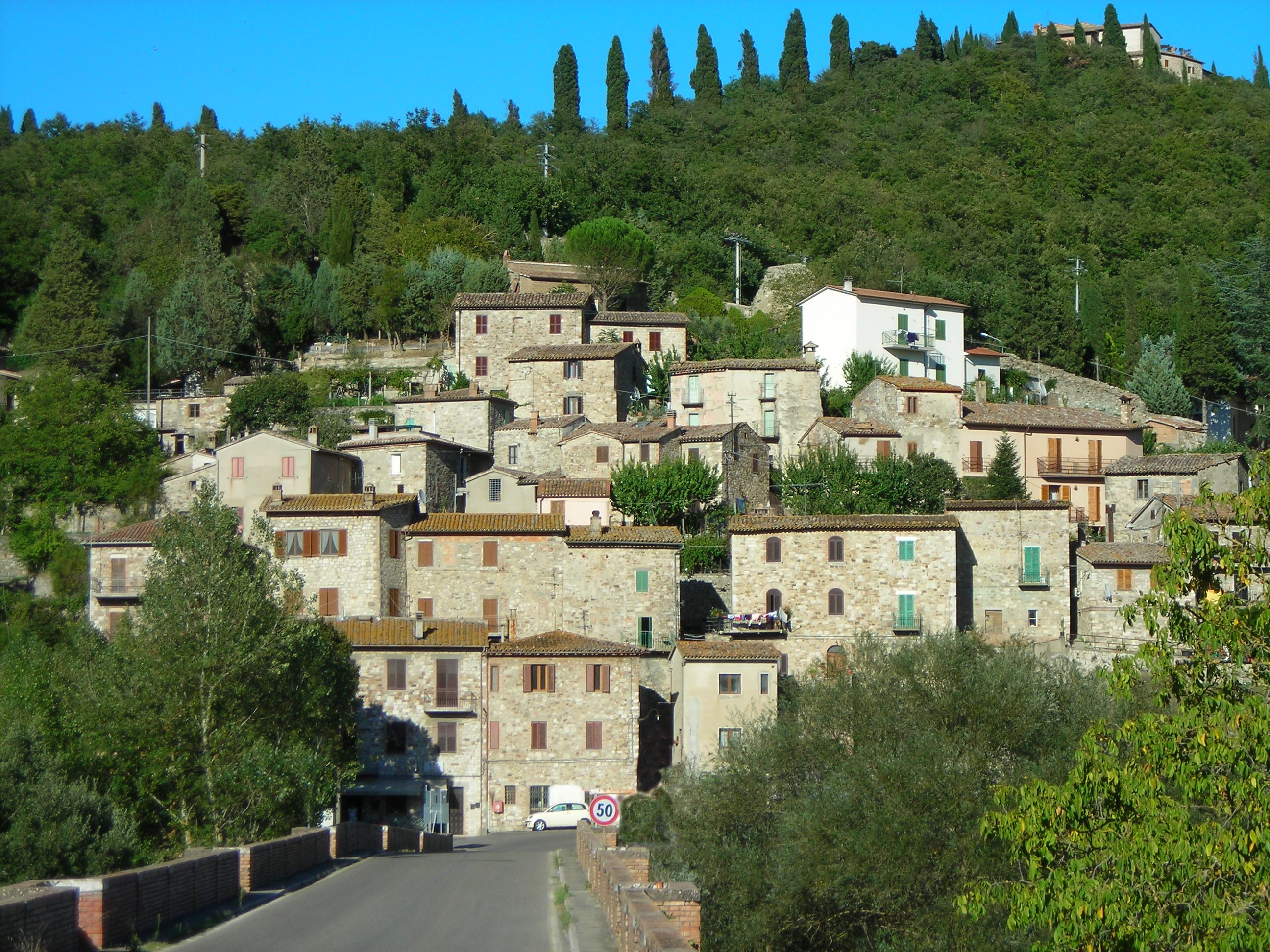 Pontecuti from statale baschi, Todi, Perugia, Umbria, Italy